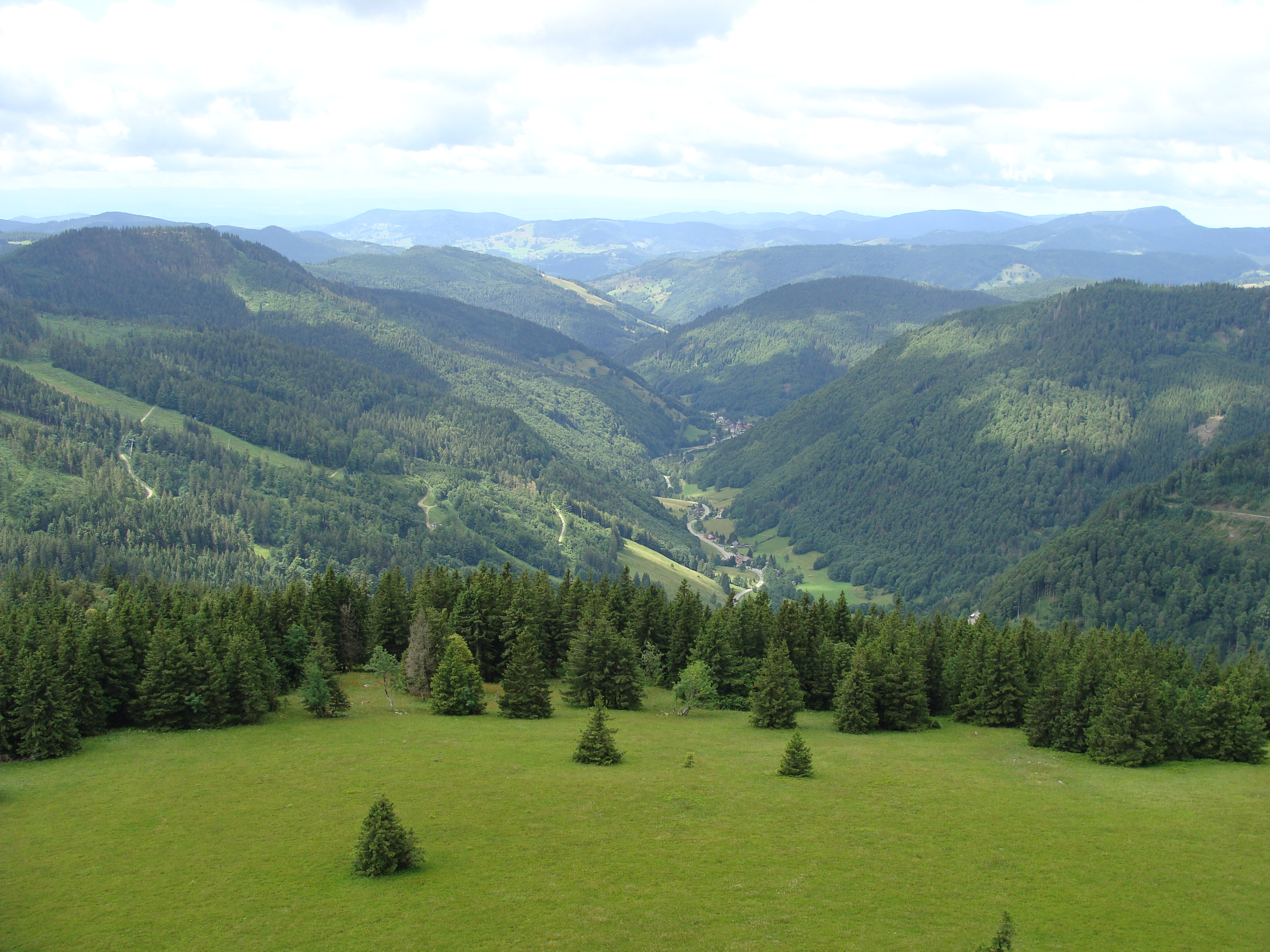 Oberes Wiesental zwischen Feldberg und Todtnau im Schwarzwald - Blick vom Feldbergturm (Seebuck); Naturpark Südschwarzwald